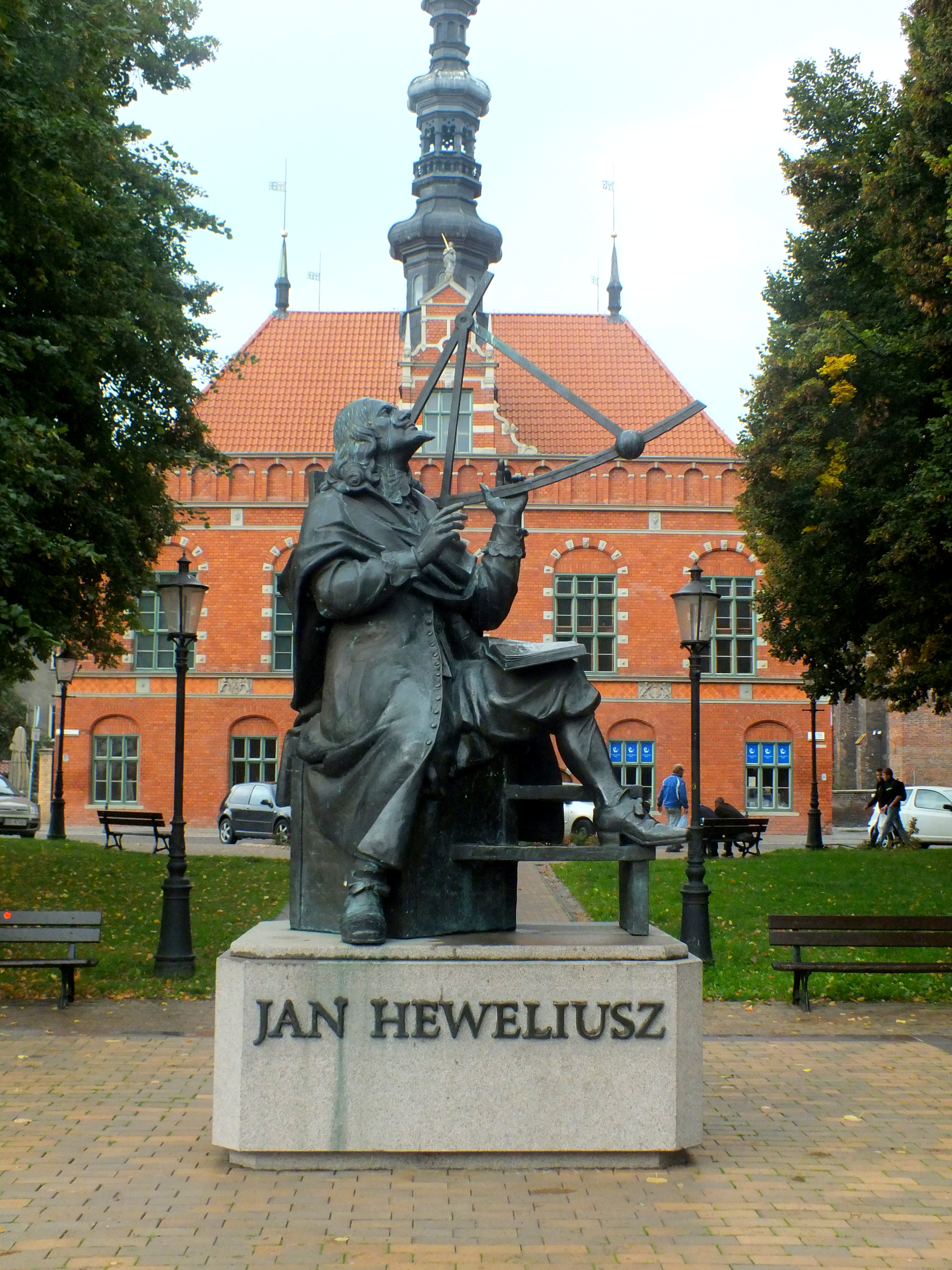 Gdańsk, pomnik Jana Heweliusza